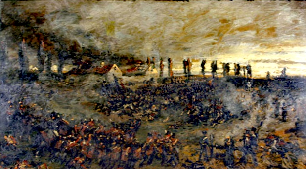 1815 Waterloo - Kampf zwischen Engländern und französischer Infanterie